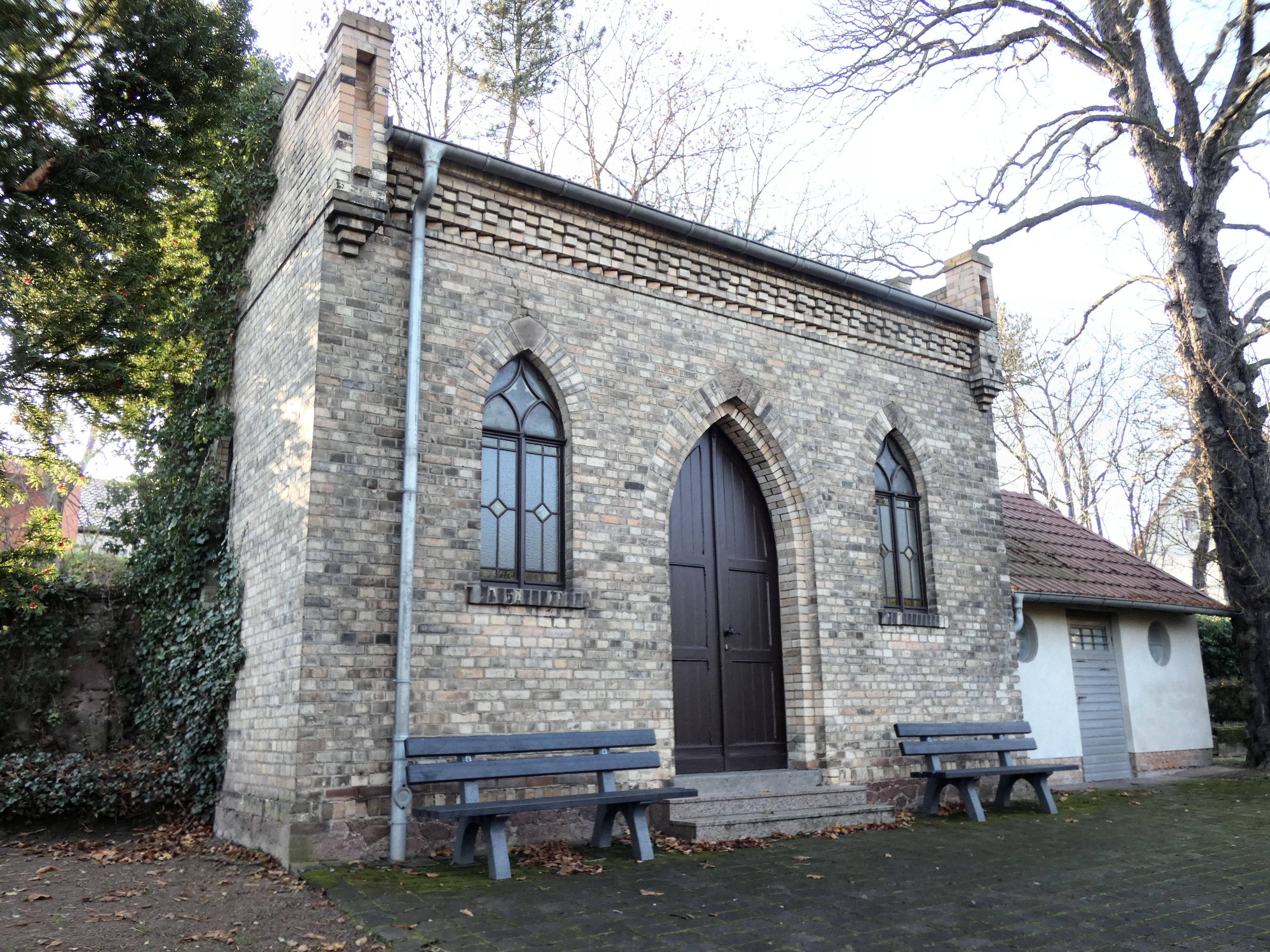 Friedhofskapelle, alter Teil des Friedhofs Kröllwitz in Halle (Saale)